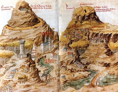 Illustrazione riportata da Antoine de La Sale nel "Paradiso della Regina Sibilla" (1420), raffigurante i Monti Vettore e Sibilla (Monti Sibillini, Marche-Umbria)